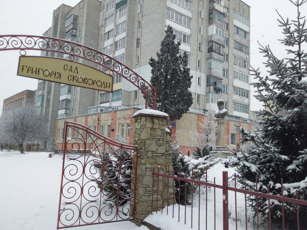 парк біля Університету "Україна"